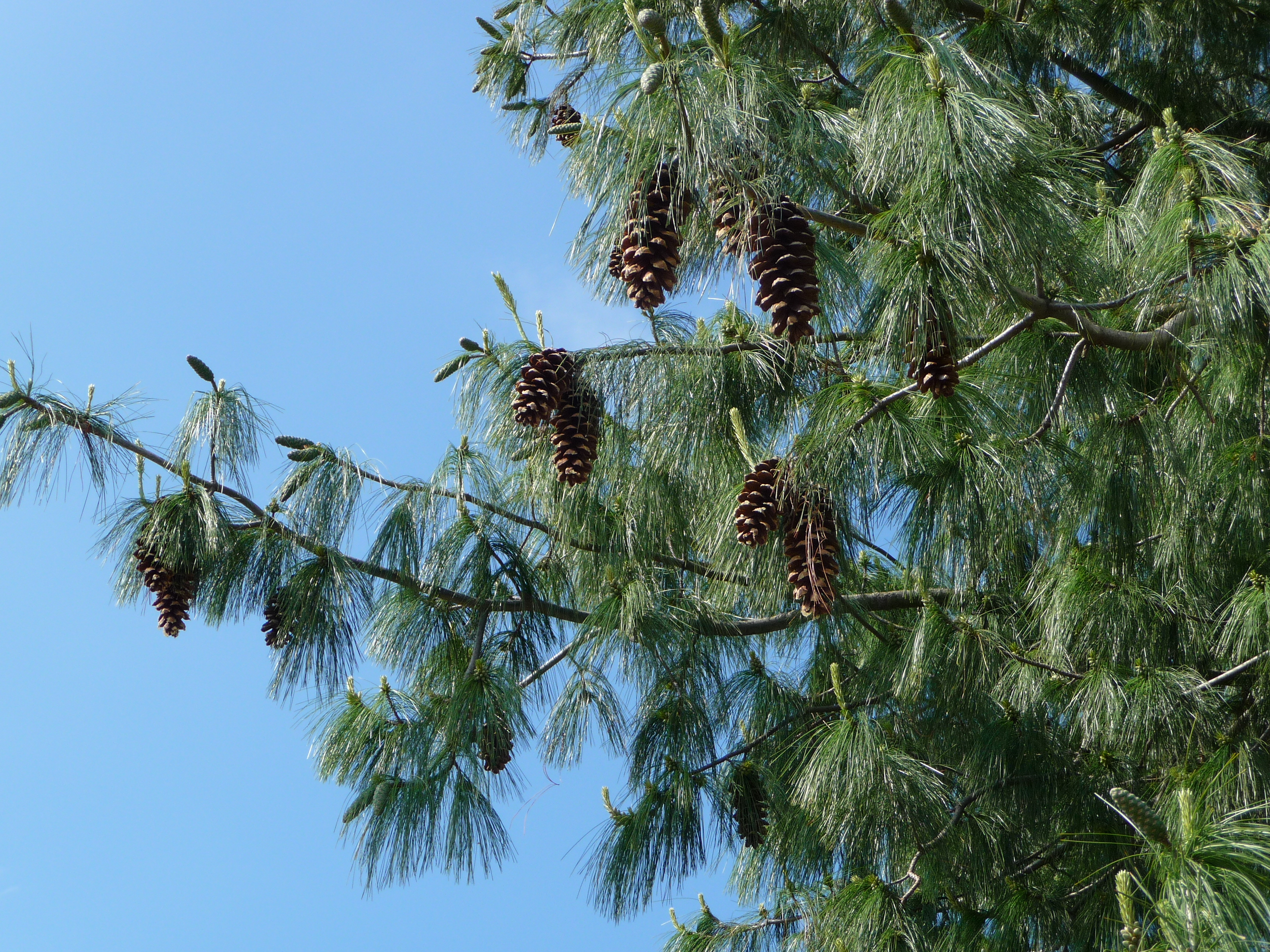 Zweig und Zapfen einer Rumelischen Kiefer, Pinus peuce, deutlich erkennbar ist das sich bildende Harz, fotografiert im nördlichen Baden-Württemberg (Deutschland)